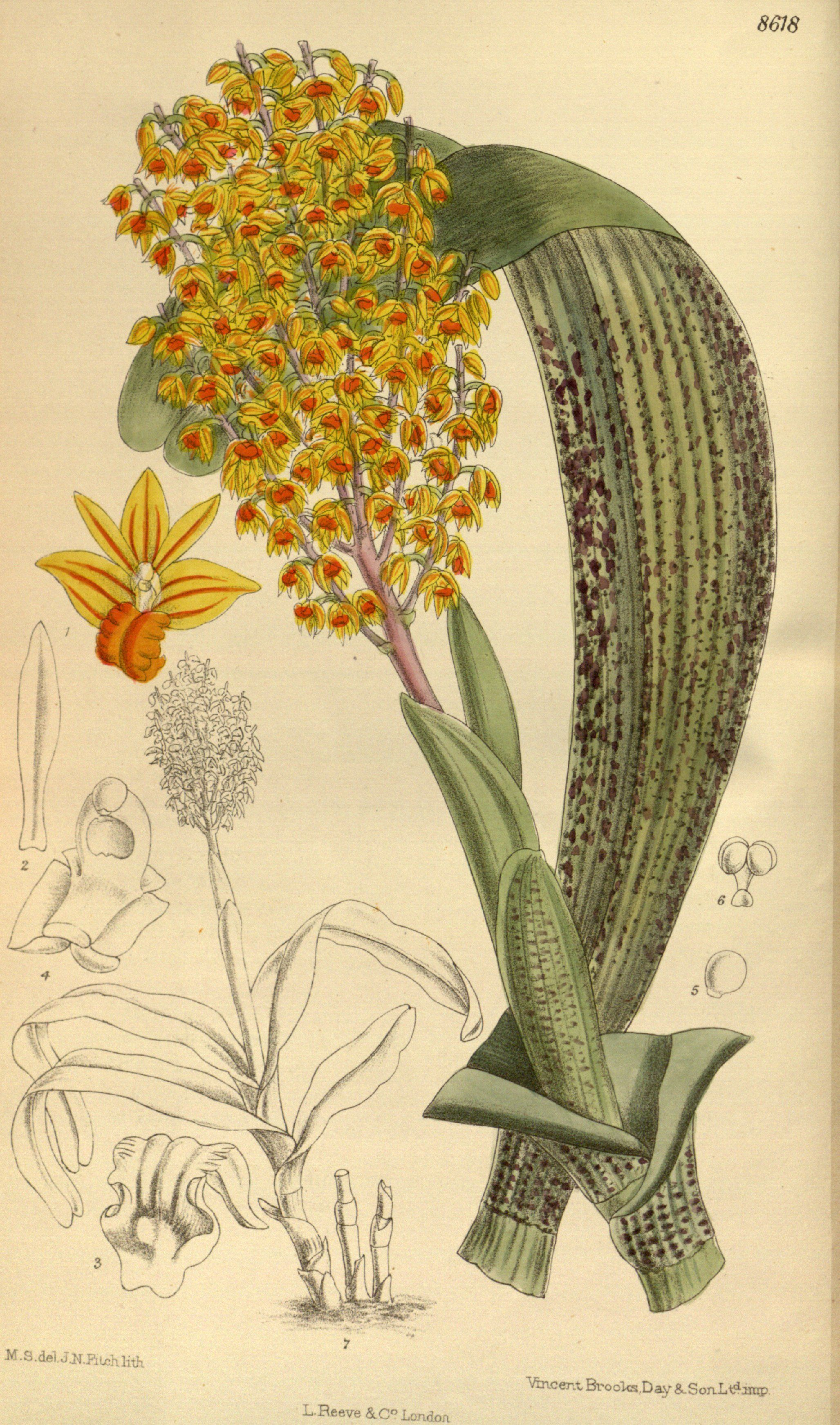 Polystachya paniculata, Orchidaceae